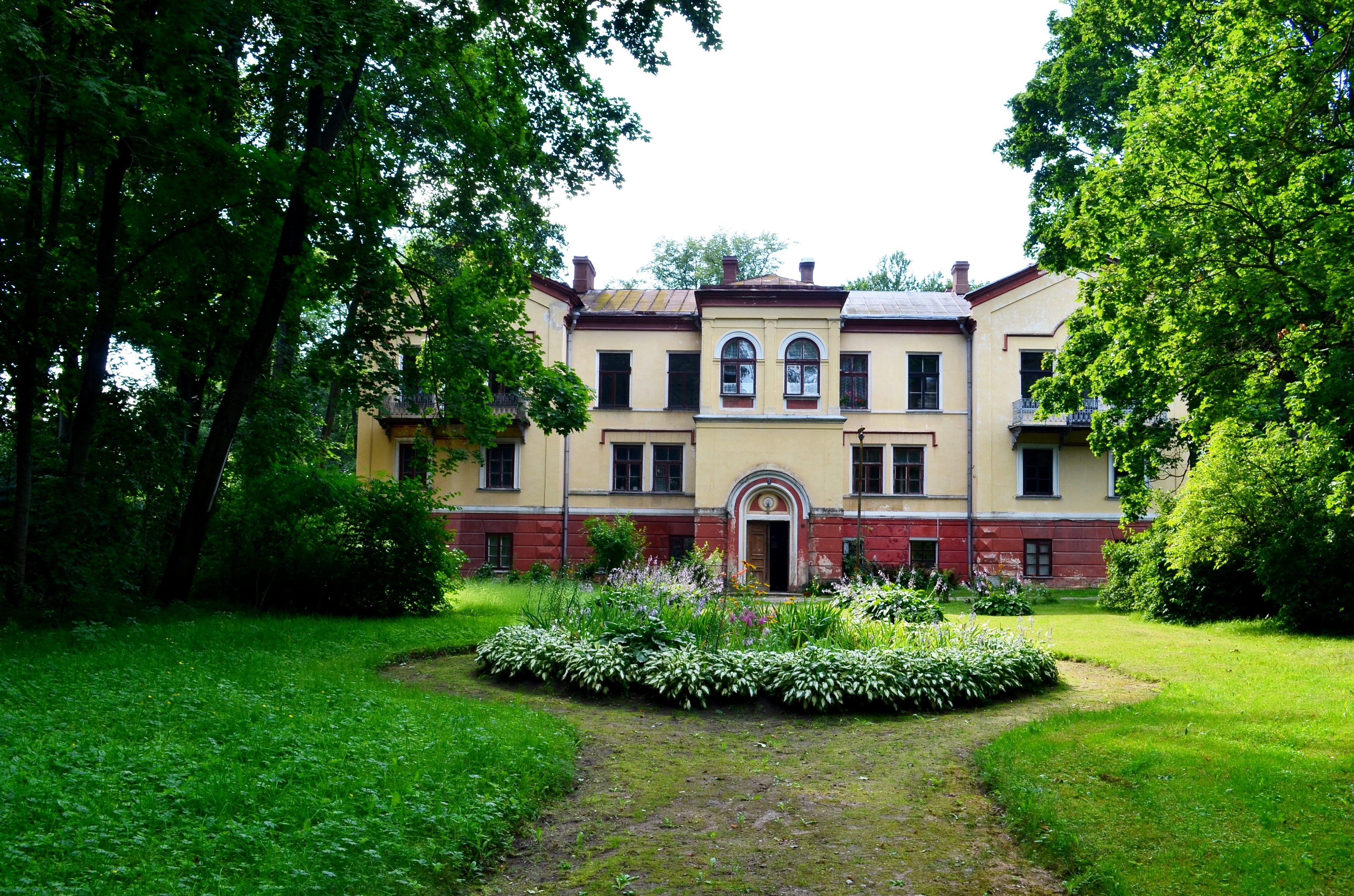 Dotnuvos dvaras Akademijoje